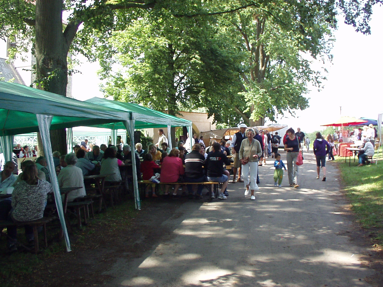 Letařovická pouť 2009